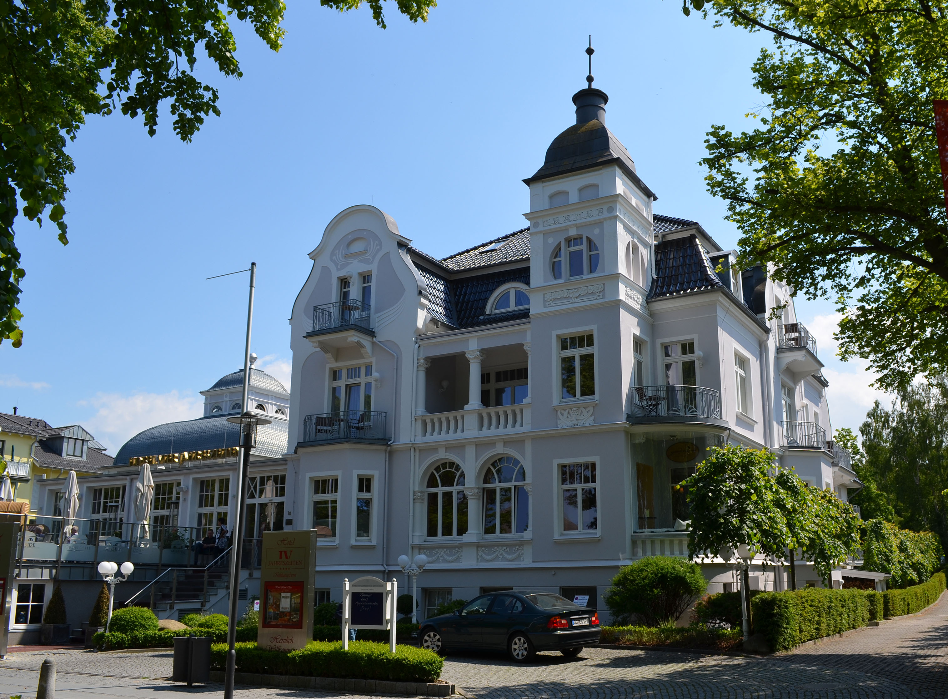 Kühlungsborn, Ostseeallee 10, Hotel Vier Jahreszeiten, ehem. Meeresburg, 3